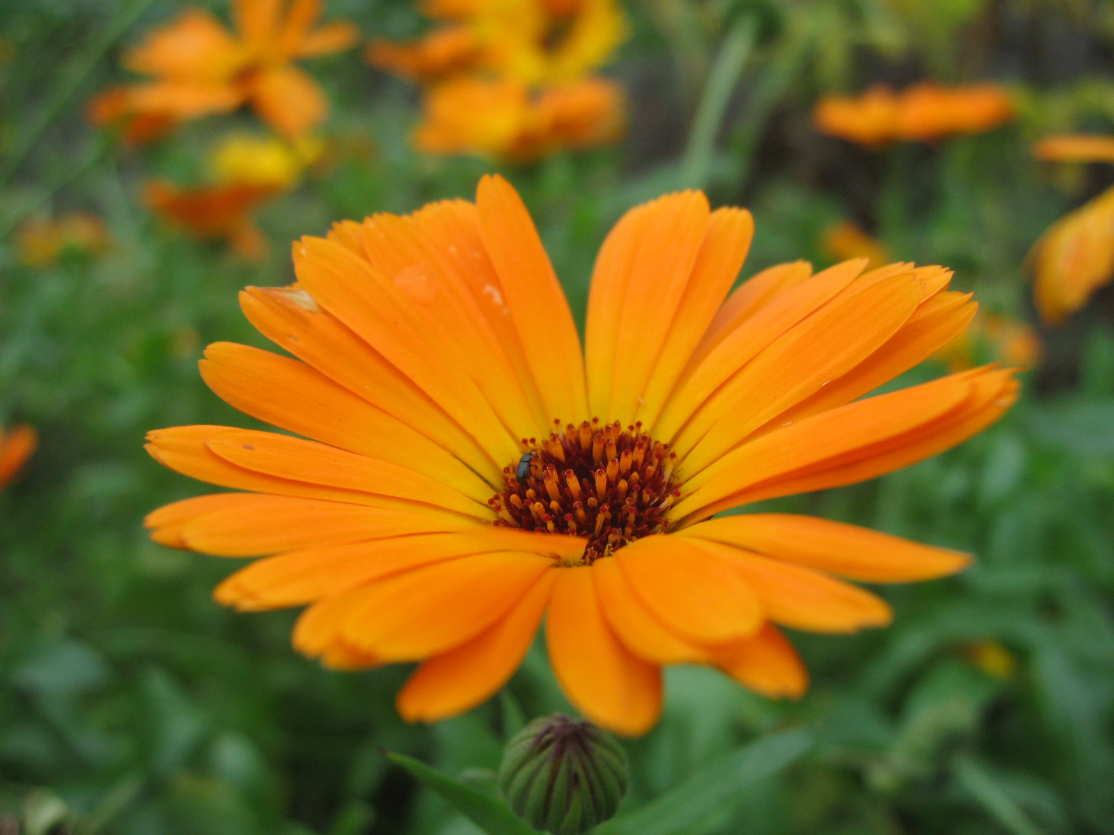 Tapanilan kasvimaalta kuvattu 2008